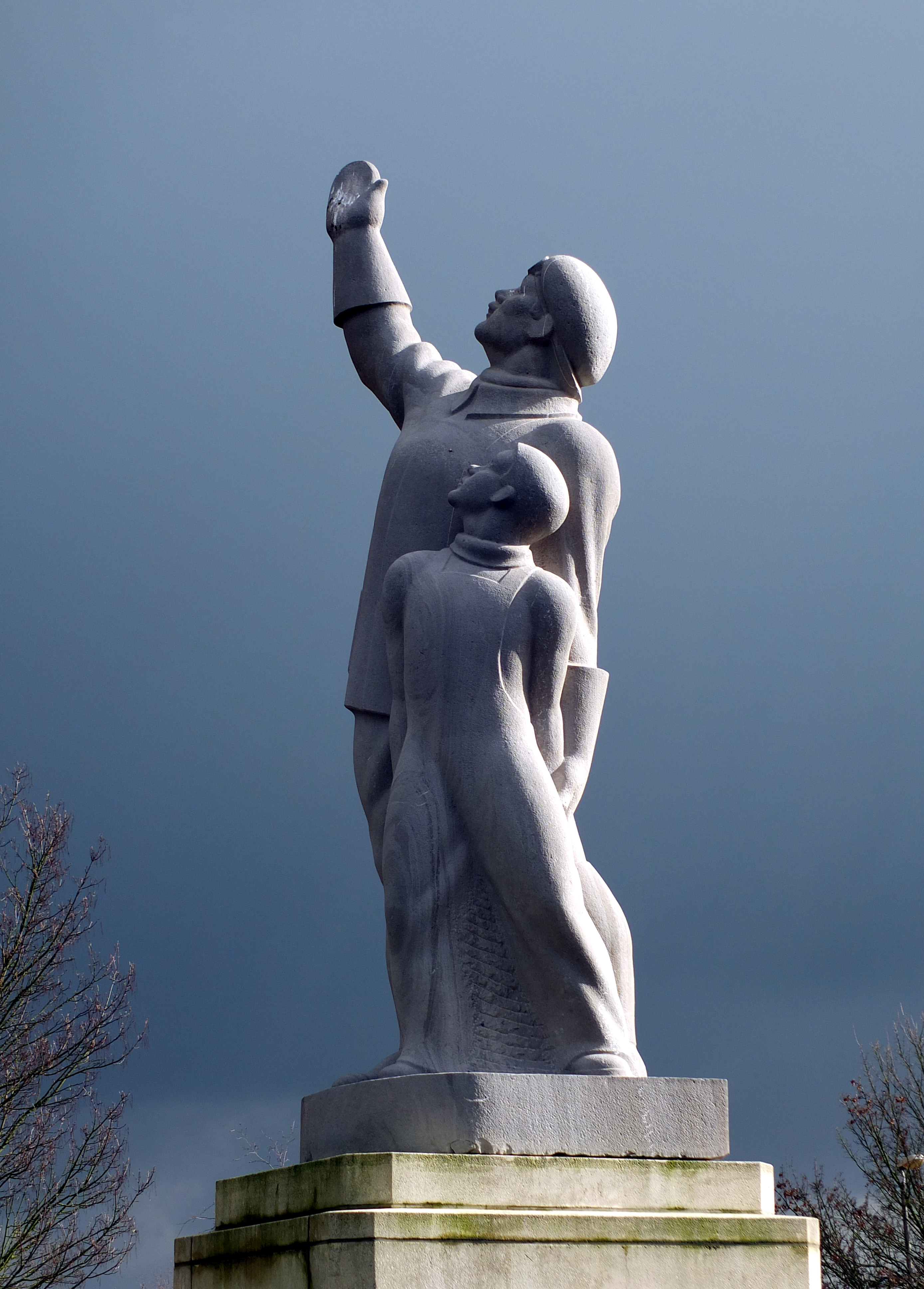 Standbeeld van Jan Olieslagers aan de Luchthavenlei te Deurne. Het beeld werd vervaardigd door Willy Kreitz. Op 14 mei 1953 werd het ingehuldigd door mevrouw Olieslagers.